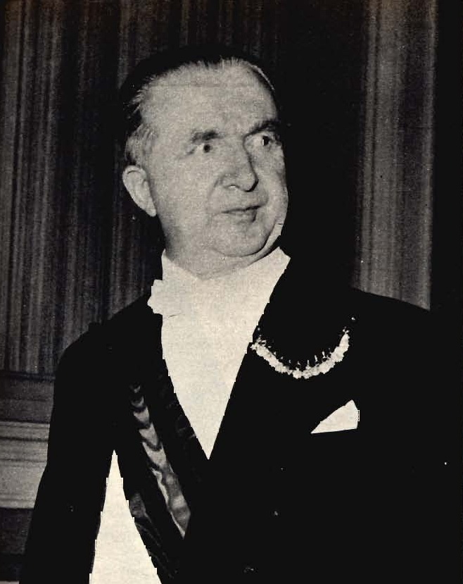 Italian politician Giuseppe Pella